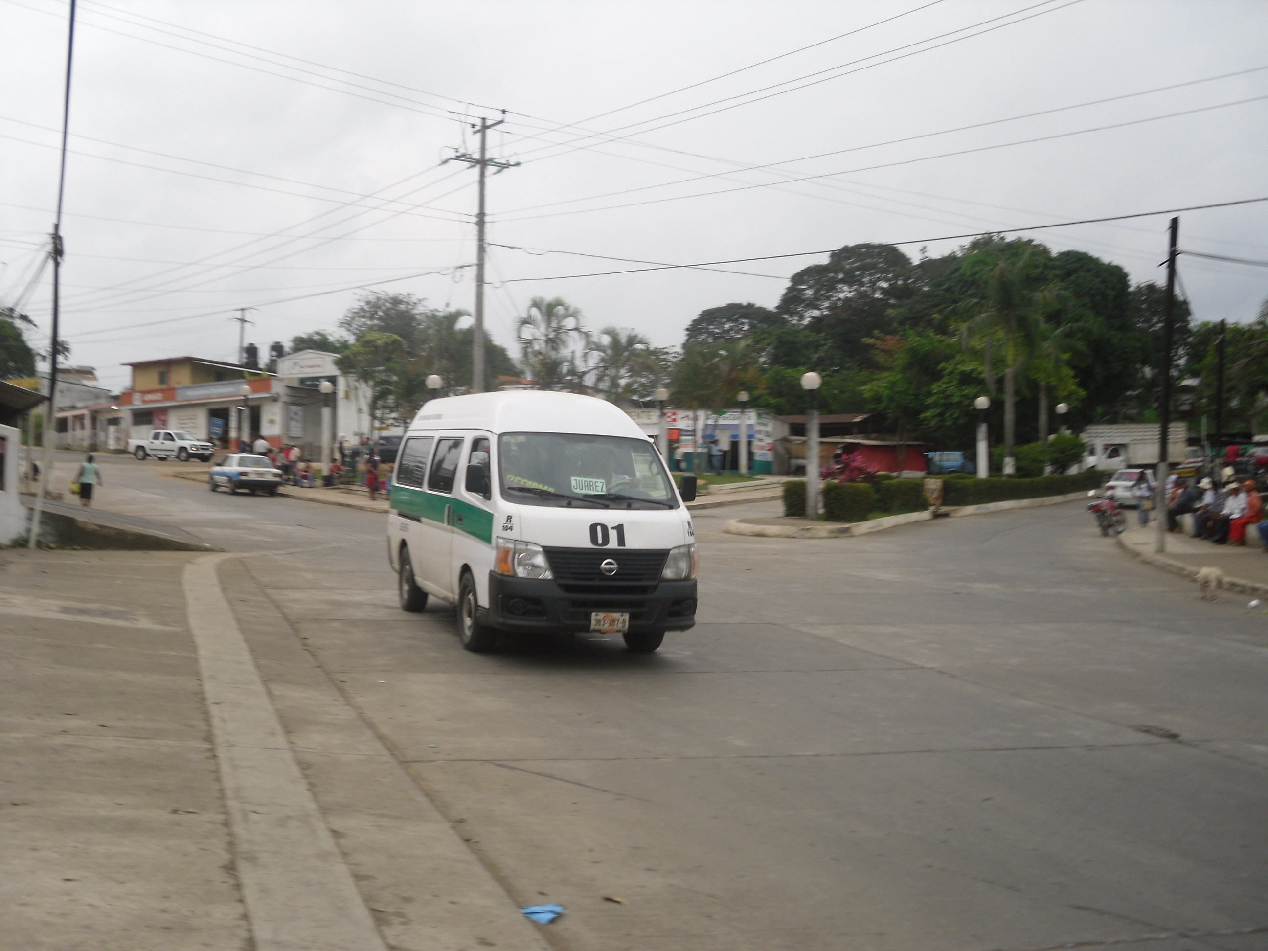 Centro de Cd. Juárez, Chiapas. JUAREZ, CHIAPAS. Es un municipio bastante amplio, cuanta con: Unión ganadera local, unidad deportiva, fabrica de quesos, fraccionamientos, parque central, mercado municipal, clínica del IMSS, Centro de salud, gasolinera dentro de la ciudad, COBACH #42, DIF municipal, Secundaria Técnica #39, lienzo charro, casa de la cultura, central camionera, transporte colectivo diversos, fermentadora de cacao, panteón municipal, entre otros. Su feria tradicional se celebra el 12 de diciembre con honor a la virgen de Guadalupe.